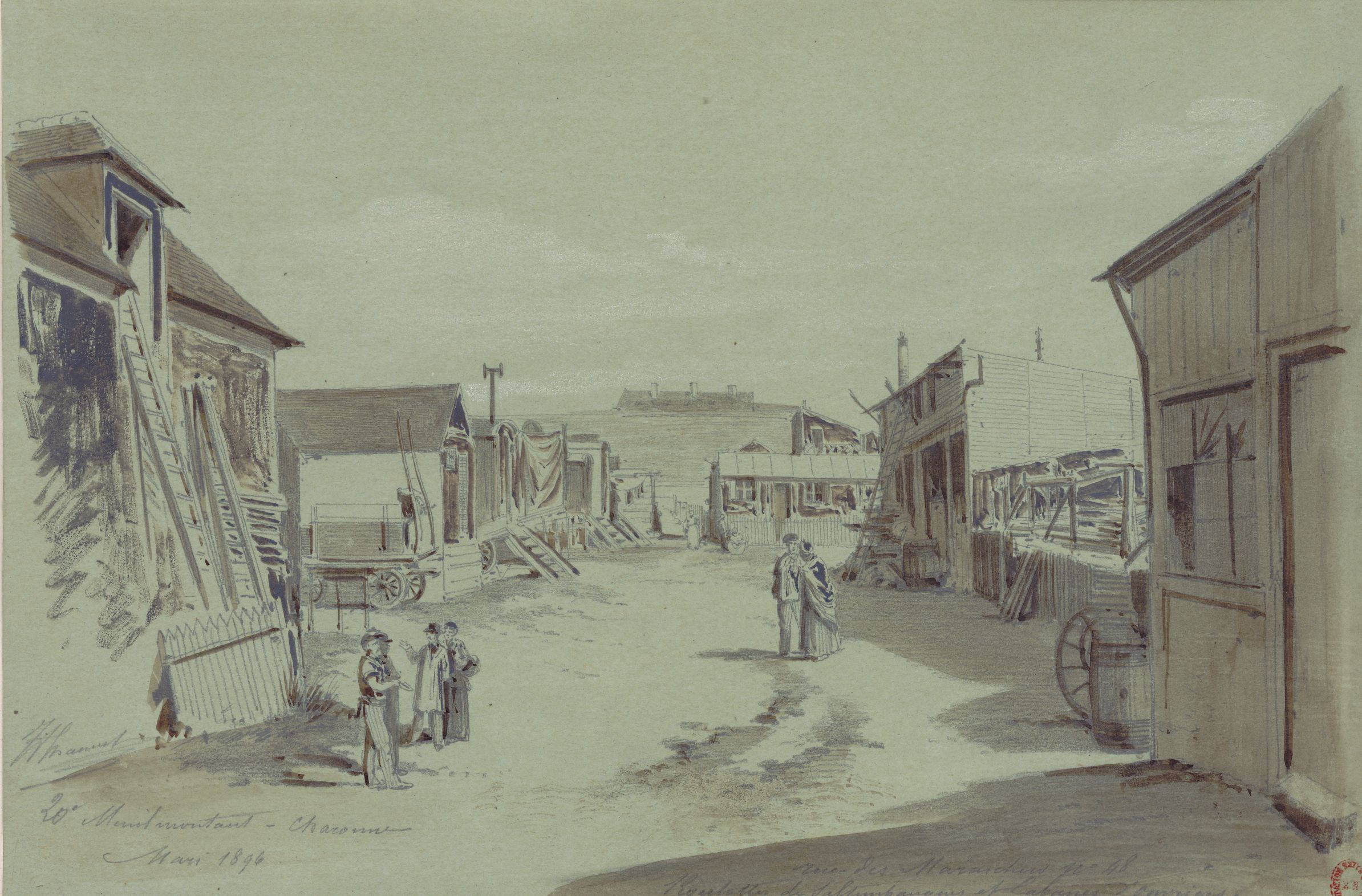 Dessin sur calque appliqué (crayon, aquarelle, rehauts de gouache ; 20,4 x 30,4 cm ). Rue des Maraichers, dans le 20e arrondissement de Paris.